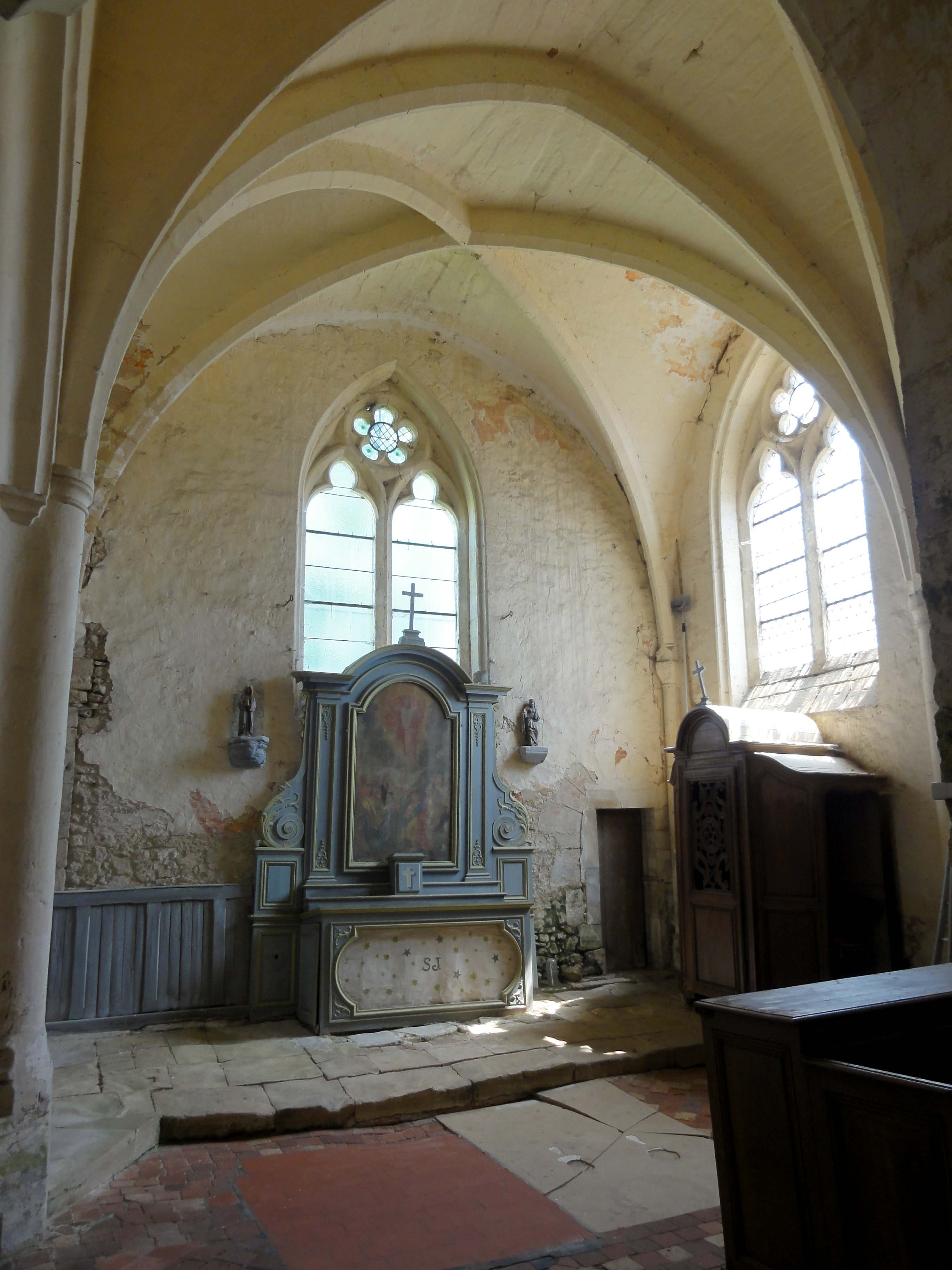 Intérieur de l'église (voir titre).